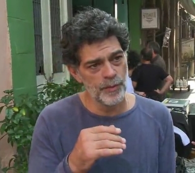 Eduardo Moscovis, nome artístico de Carlos Eduardo de Andrade (Rio de Janeiro, 8 de junho de 1968), é um ator brasileiro. Na imagem, o ator está no set de filmagem de "Pequeno Dicionário Amoroso 2 "